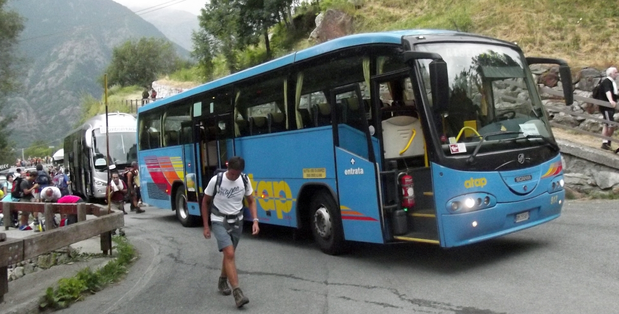 Mezzo ATAP alla partenza della processione Fontainemore - Oropa (luglio 2015)